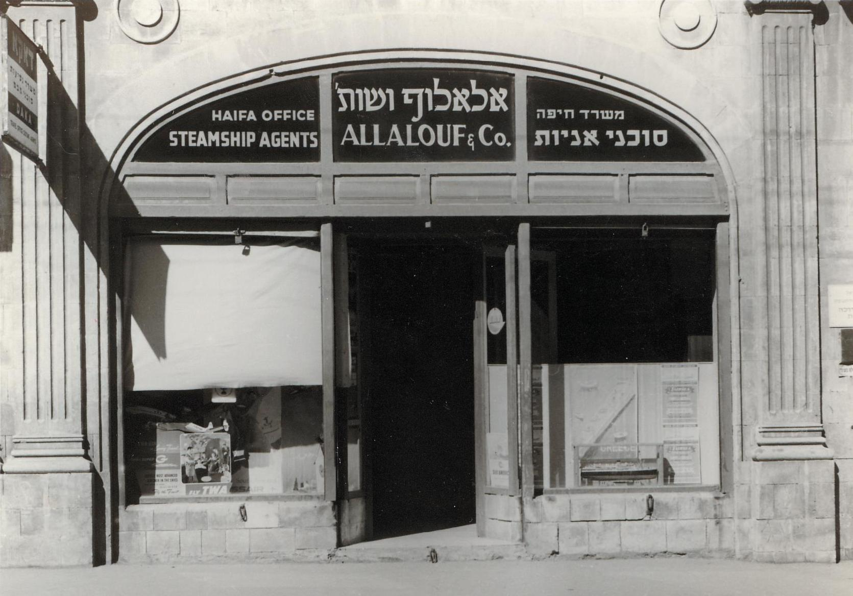 פתח משרדי אלאלוף ספנות בחיפה, שנות ה-50 בישראל